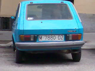 ¿FIAT127 ó SEAT 127? ~79 5MAD 2008